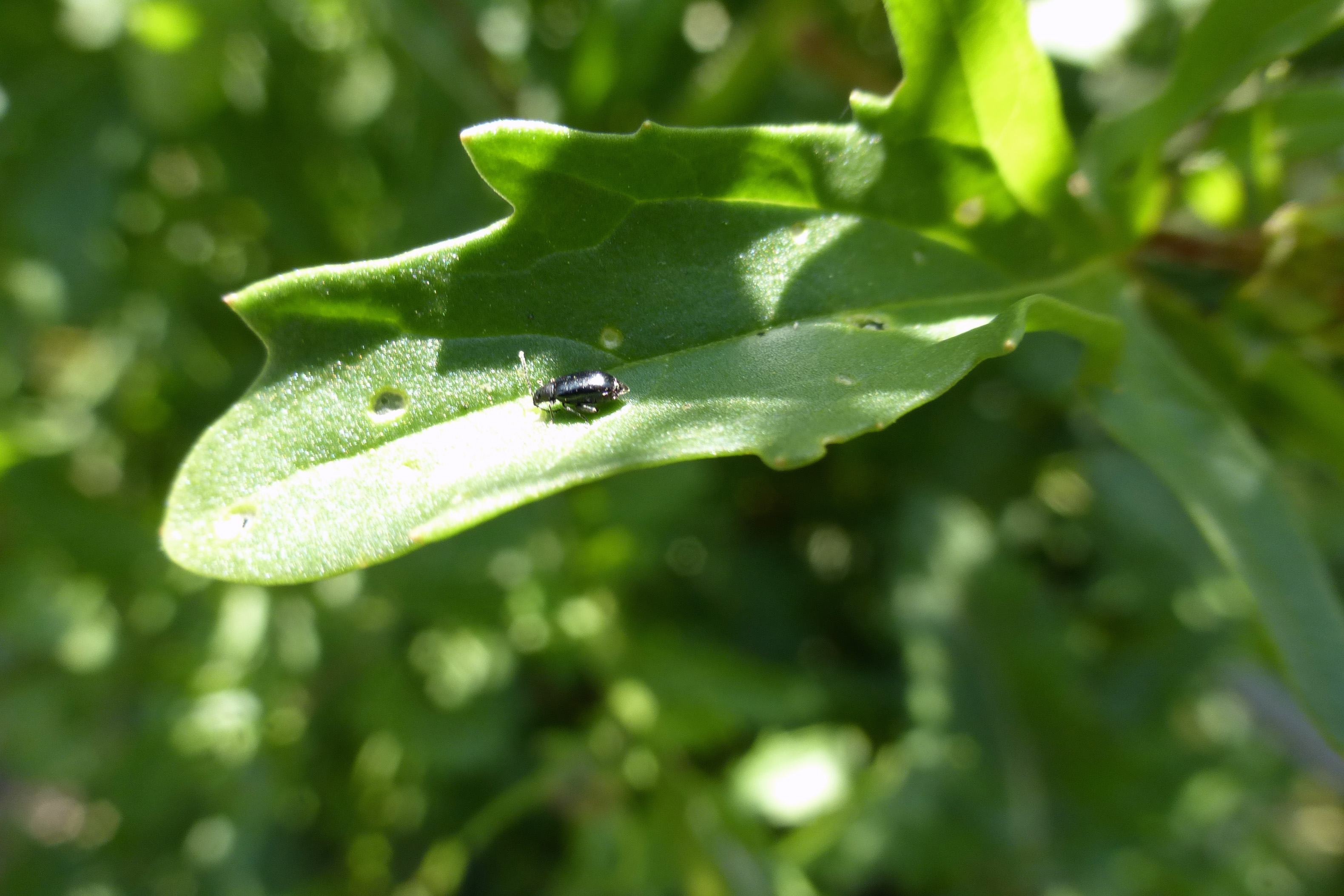 altise sur une feuille de roquette